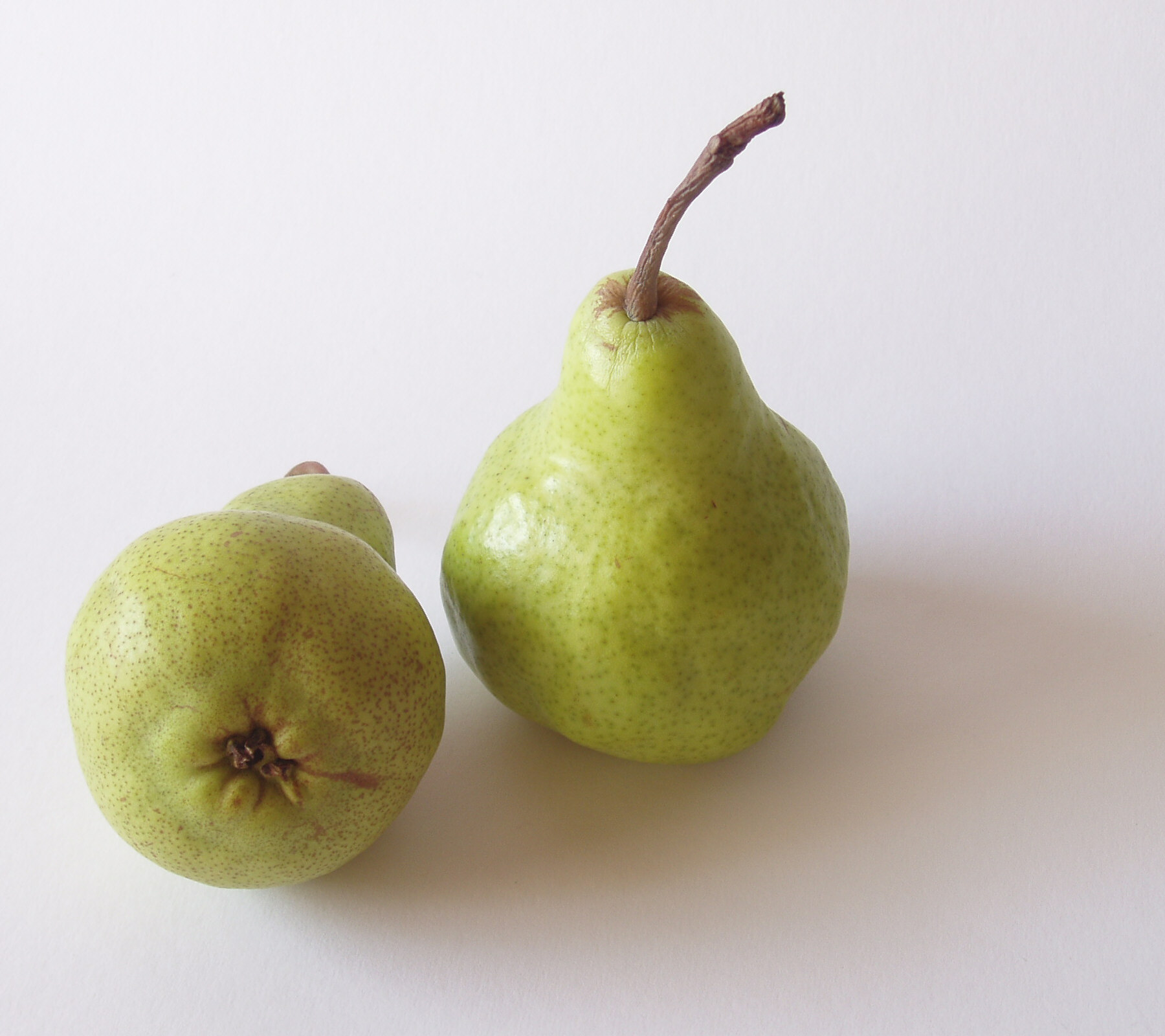 Birne, Sorte Peckham